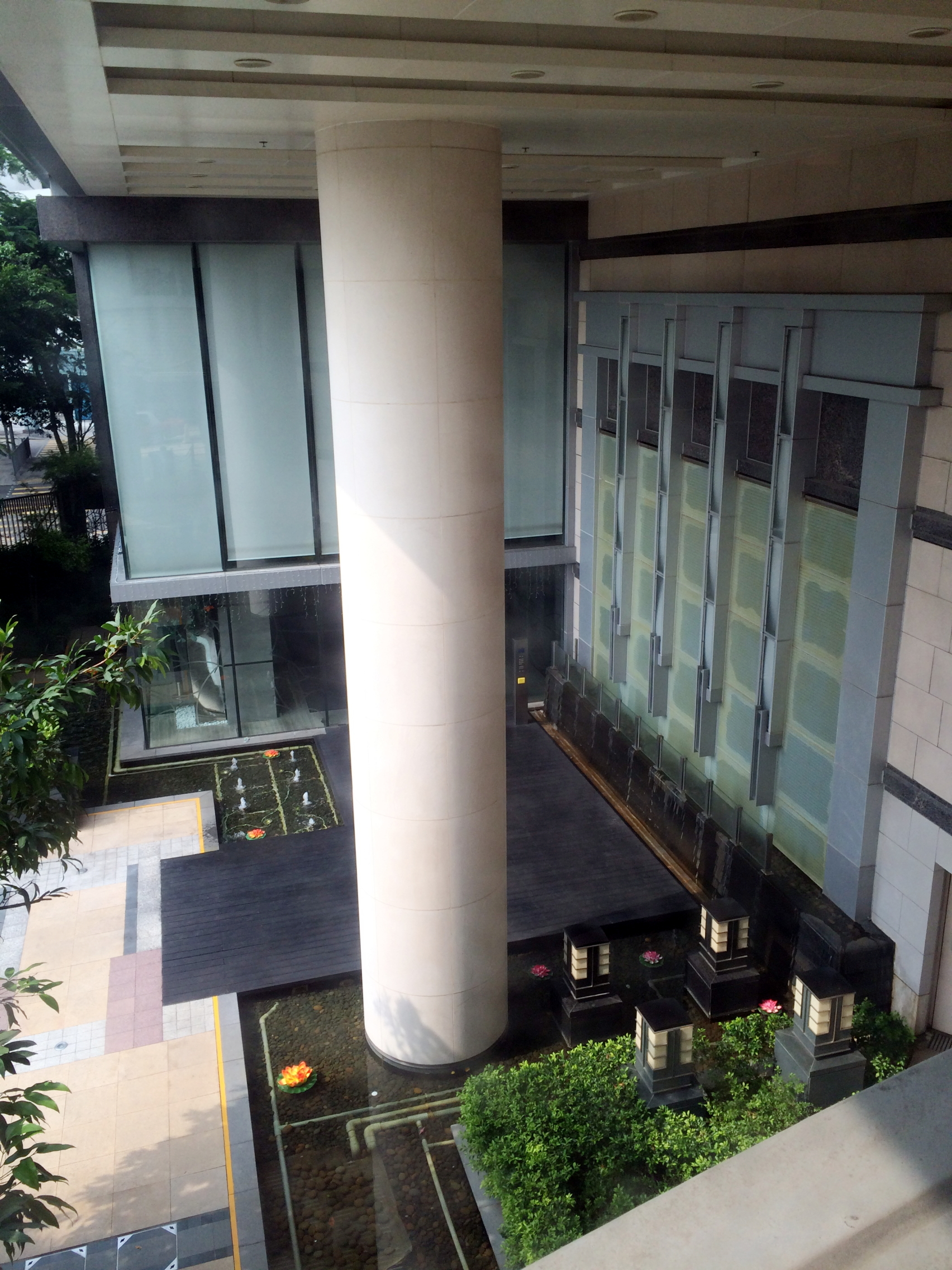 The Sparkle GF Garden